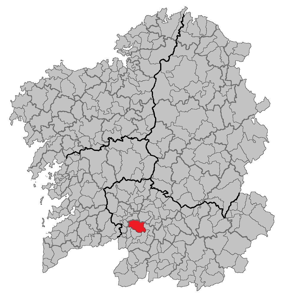 Mapa coa localización do concello de Cartelle.